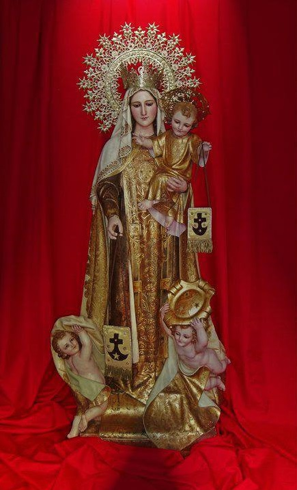 Imagen de la Virgen del Carmen la Barcelonesa